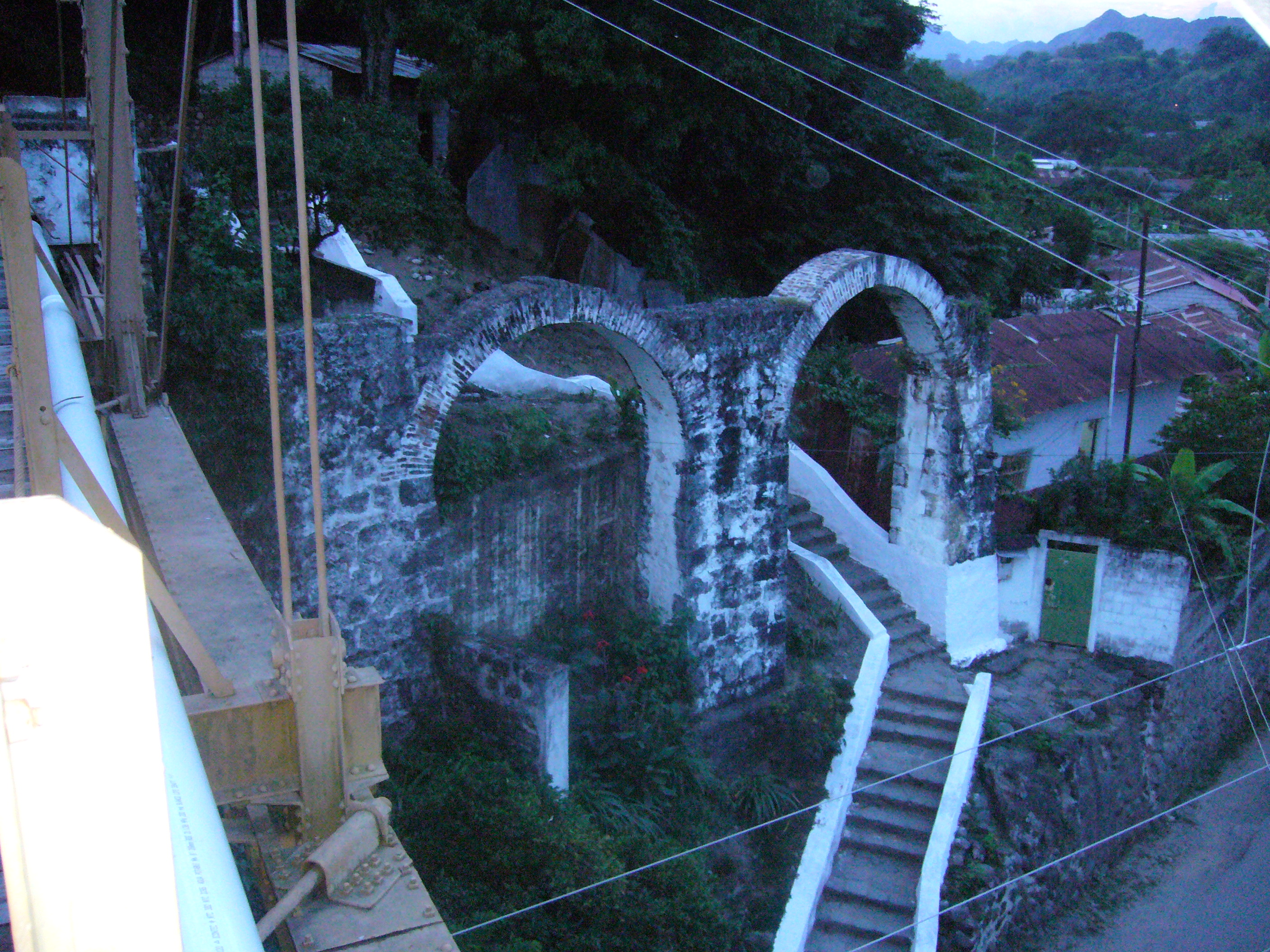 Ruinas de Antiguo acueducto en Honda (Colombia)